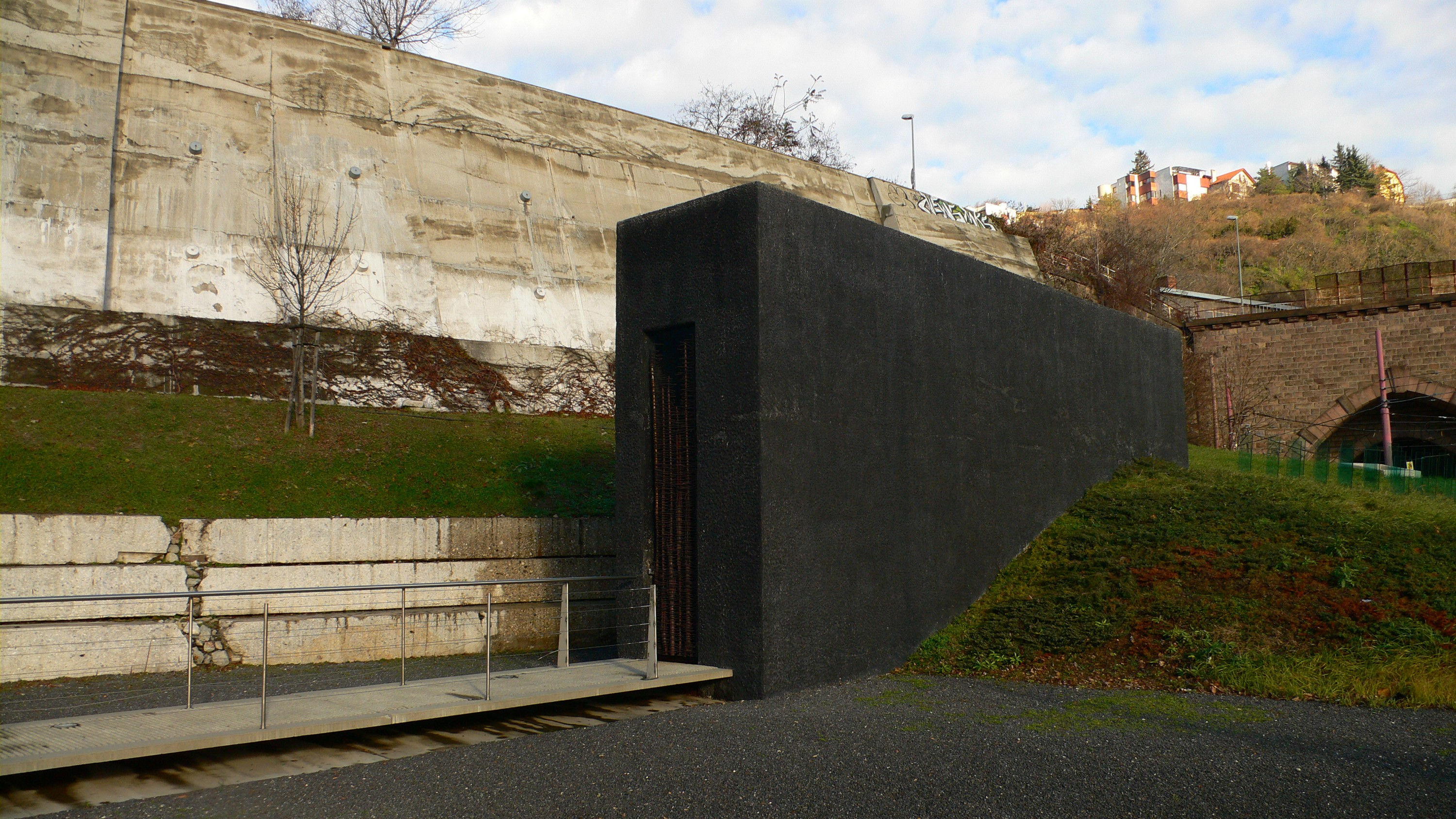 Mauzóleum Chatama Sófera